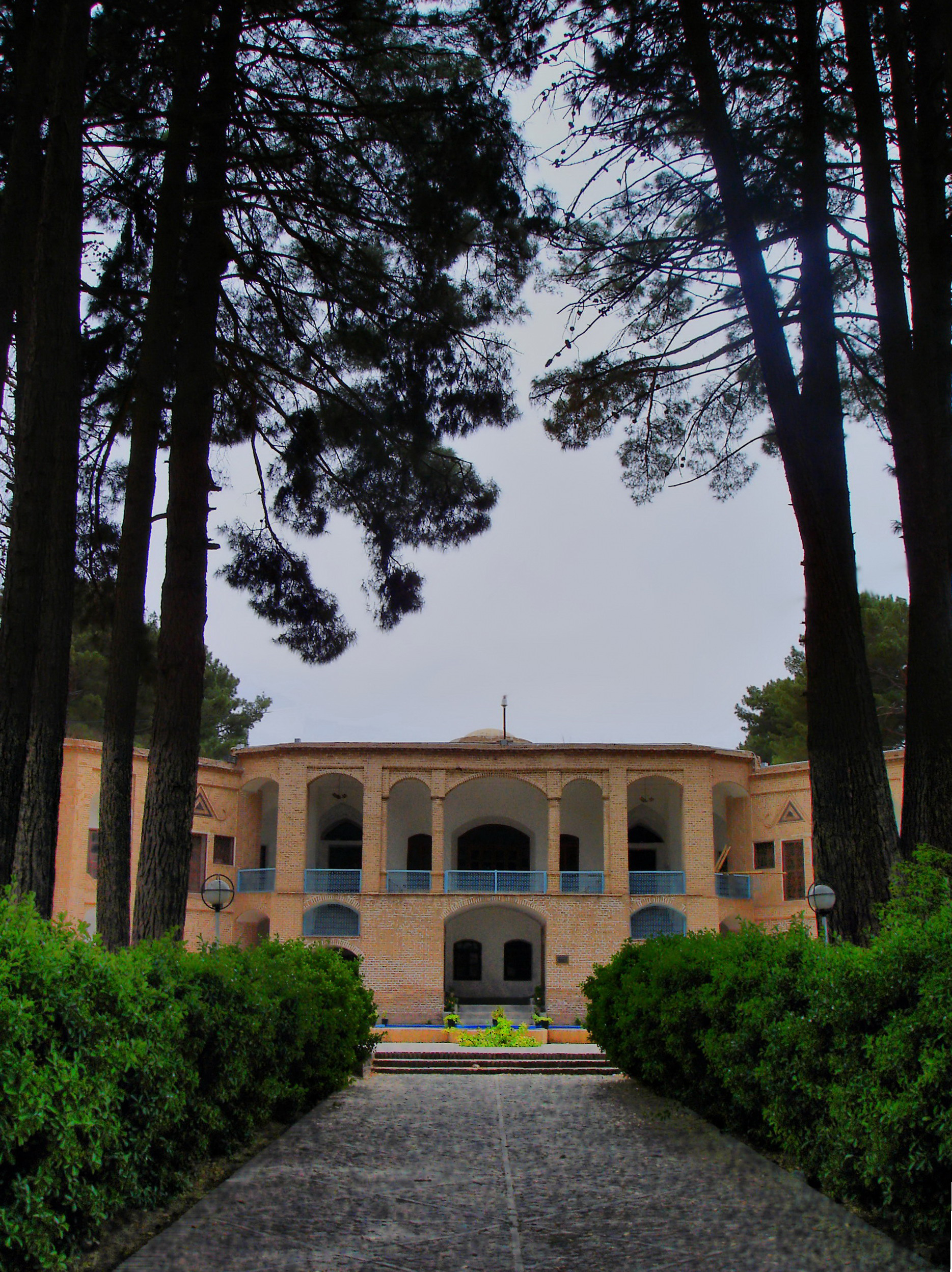 Dowlatabad Garden